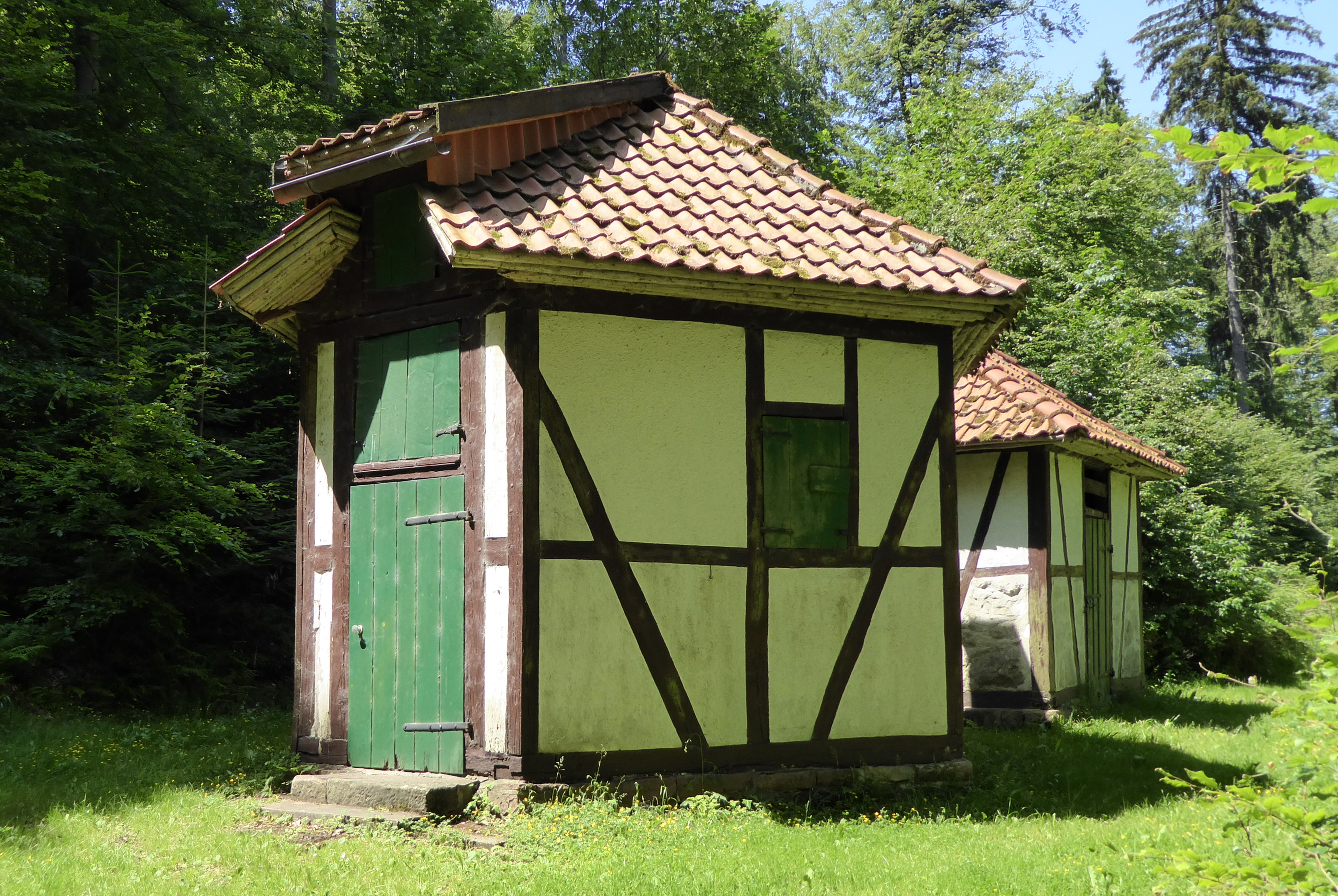 Totenberghäuschen am Totenberg im Bramwald, Südniedersachsen. Erbaut Anfang 19. Jh. als Unterkunft bei Forstinspektionen (vorne) und Pferdestall (hinten).